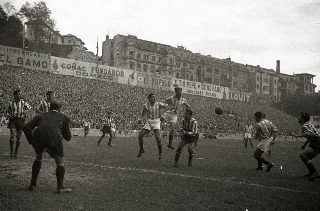 Título original: Partido de la Real Sociedad en Atotxa (2/16) Localización: San Sebastián (Guipúzcoa)